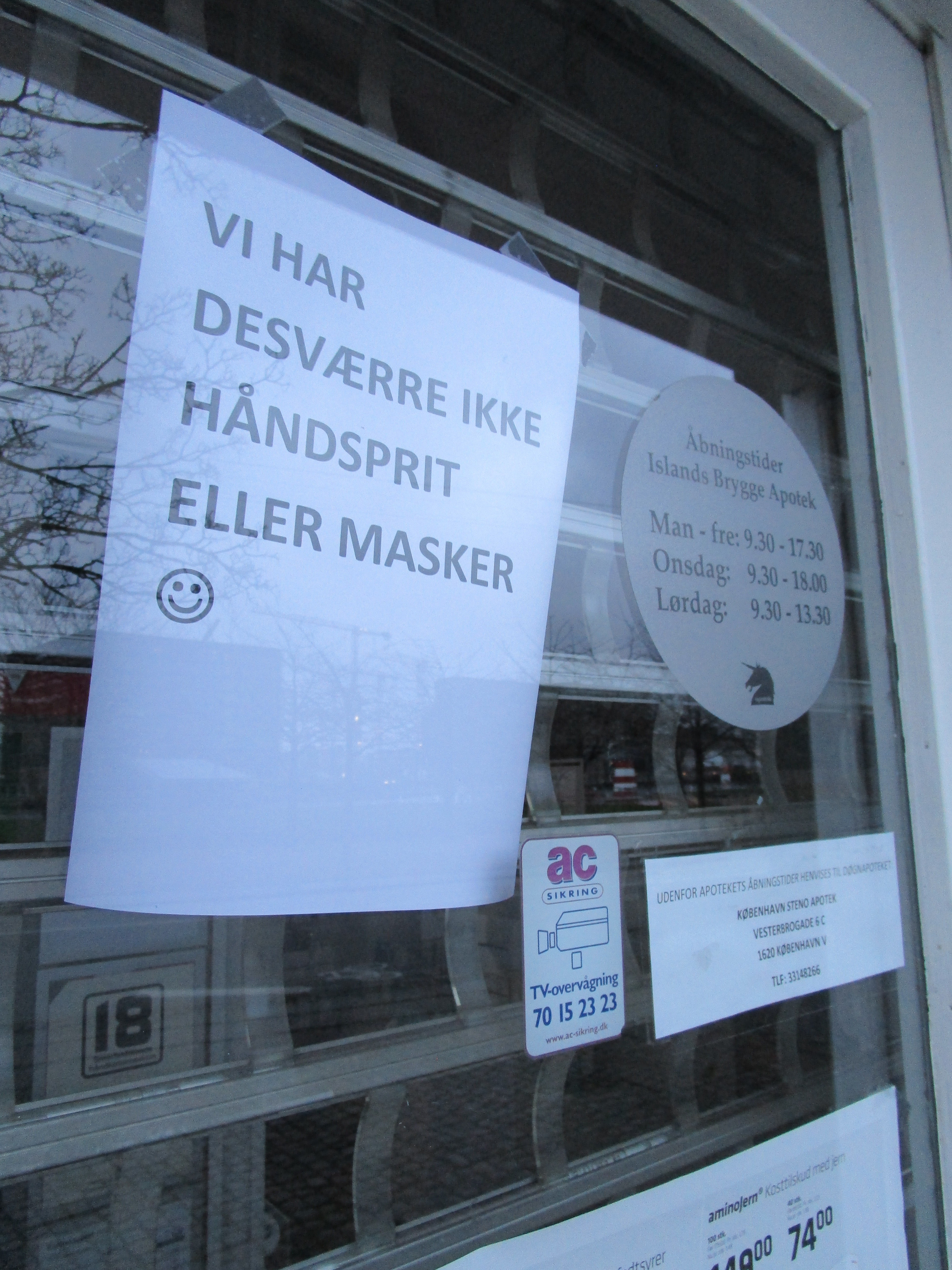 Auglýsing í glugganum hjá Islands Brygge Apotek, 12. mars 2020: Því miður er hvorki hægt að kaupa grímur né handspritt hér. Handspritt er víðast uppselt í apótekum í Danmörku.